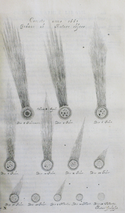 Tavola N dell'opera Cometographia di Johannes Hevelius